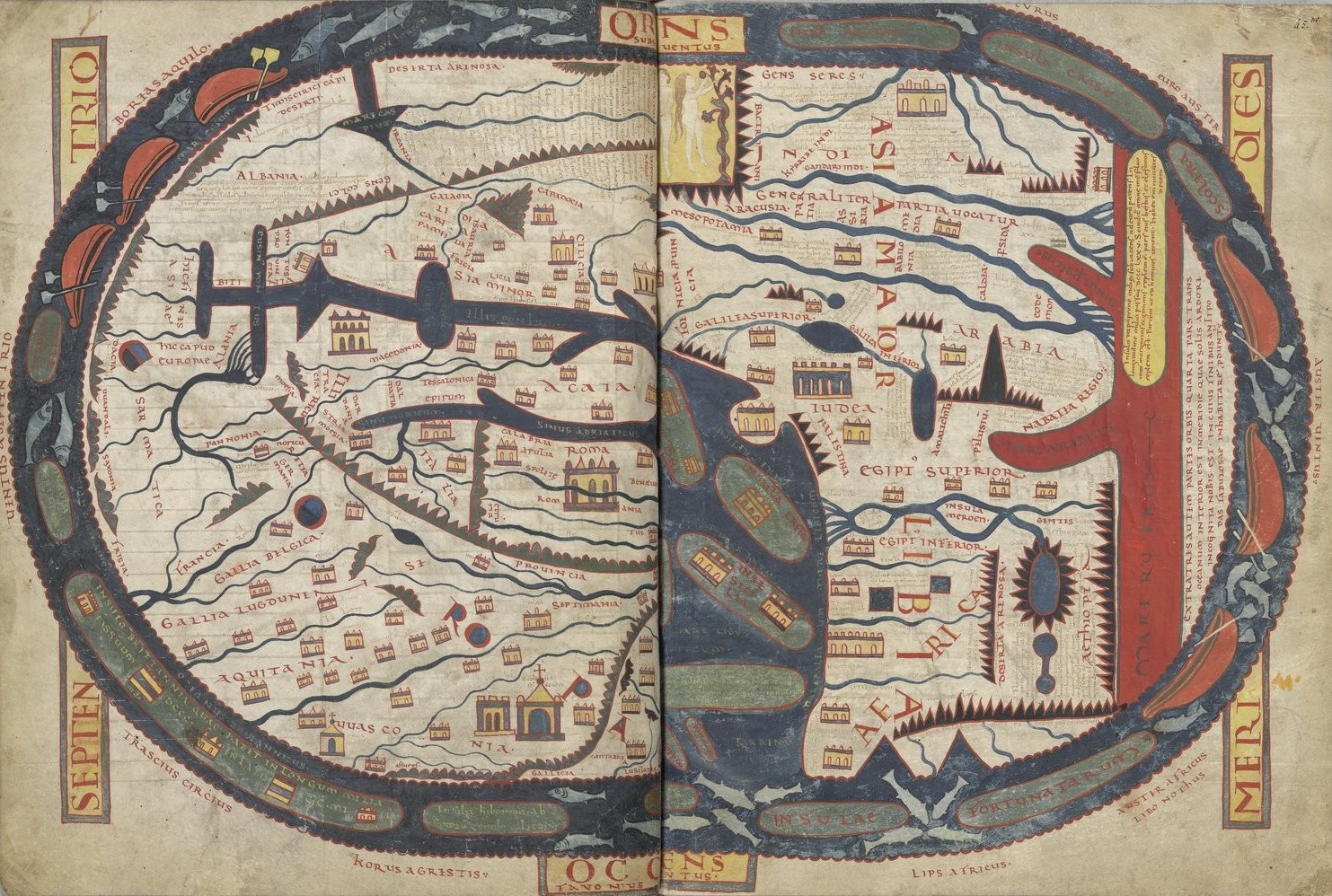 Eluminure Apocalypse de Saint Sever. fol. 45bv-45t